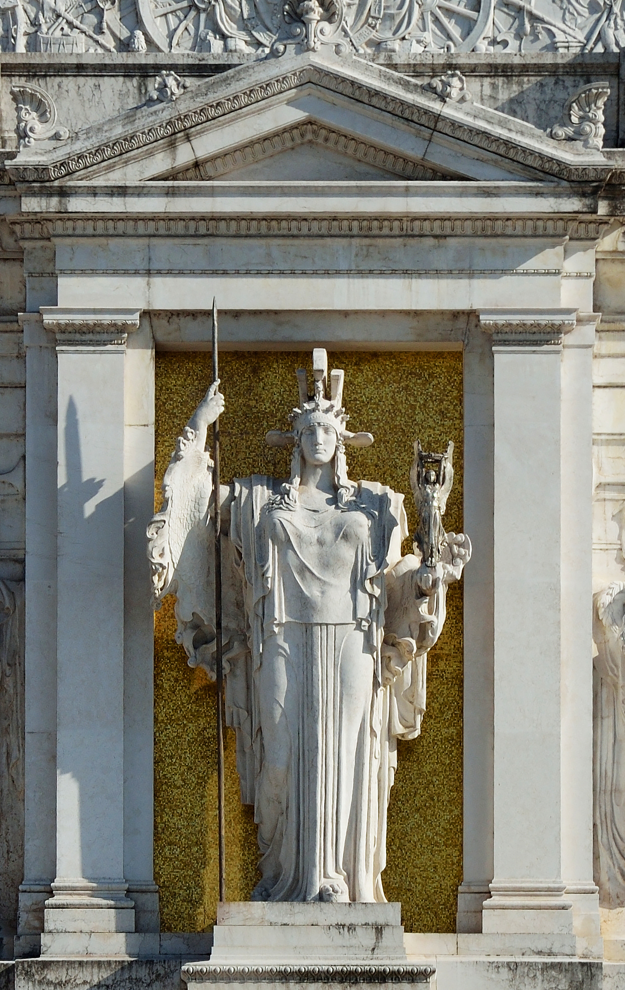 Statua massonica della Dea Roma al Vittoriano